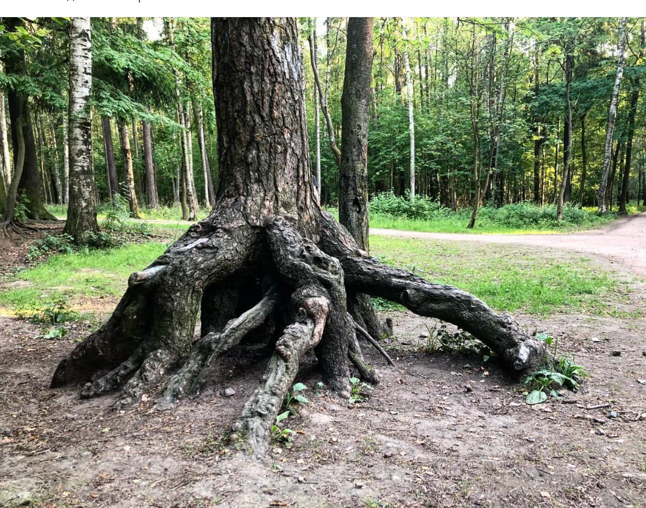 The original tree in the park